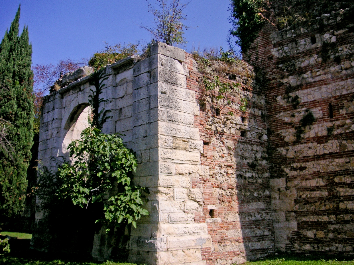 Mura scaligere occidentali, Rocchetta